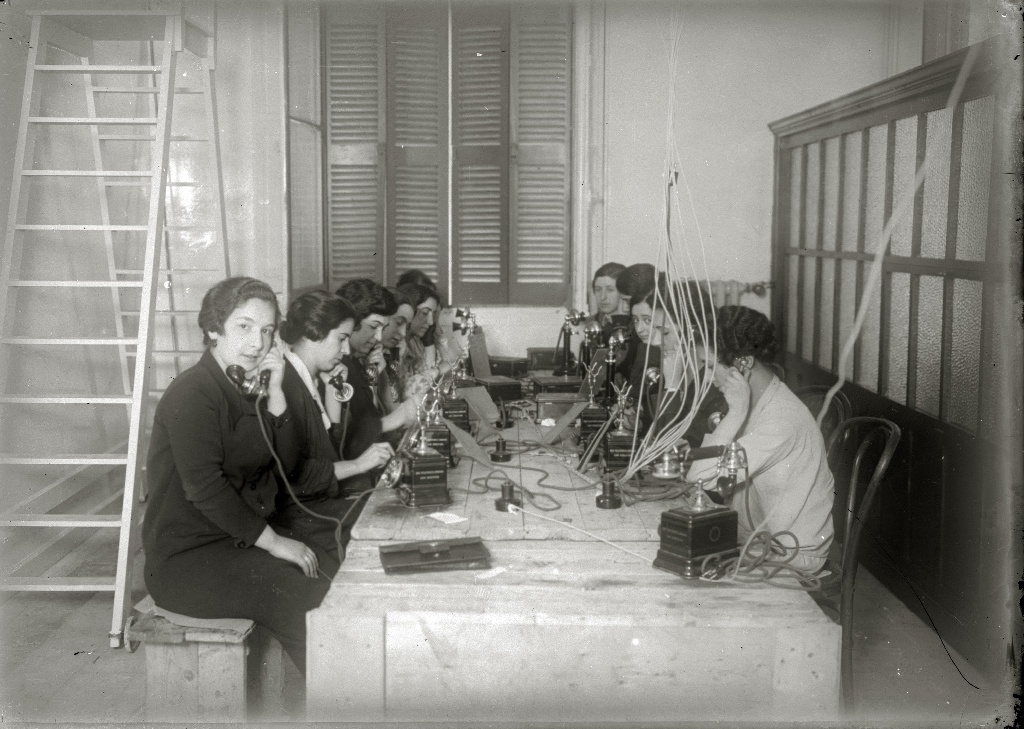 Título original: Central telefonica en San Sebastián (5/8) Localización: San Sebastián (Guipúzcoa)